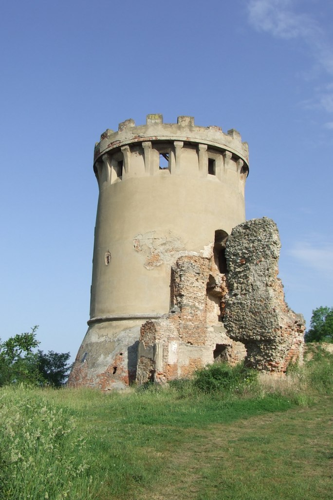 Ardud citadel, Satu Mare County, Romania